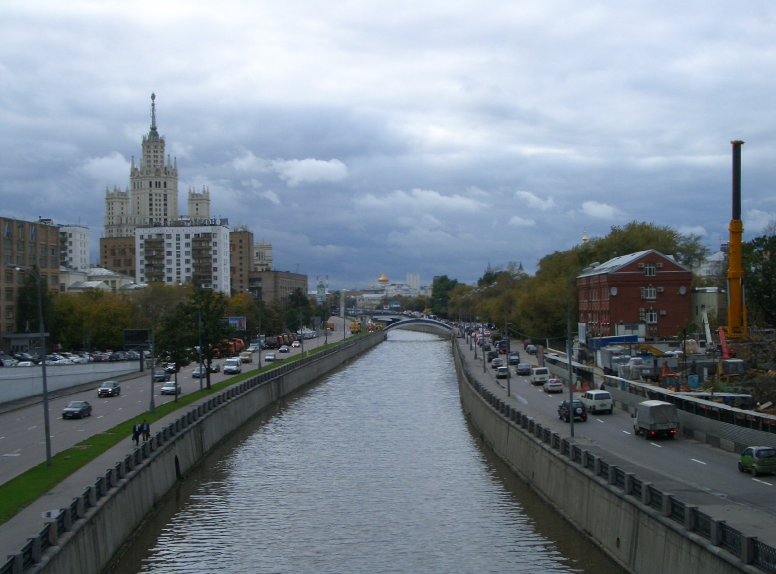 Der Fluss Jausa im Moskauer Stadtgebiet, Oktober 2006